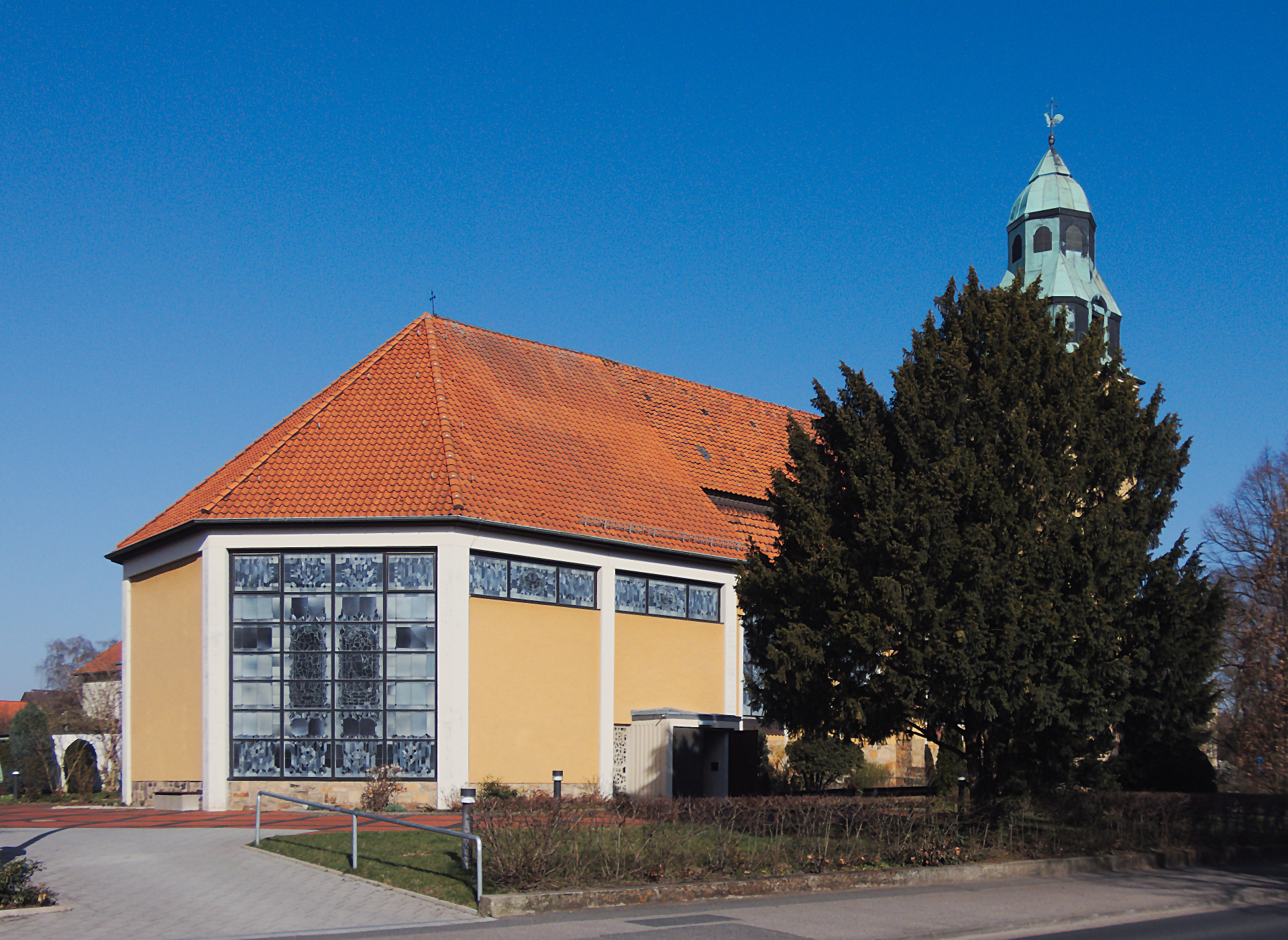 Die katholische Kirche St. Bonifatius in Gehrden, Region Hannover wurde 1910/11 in neobarocken Formen erbaut und 1980/81 erweitert.